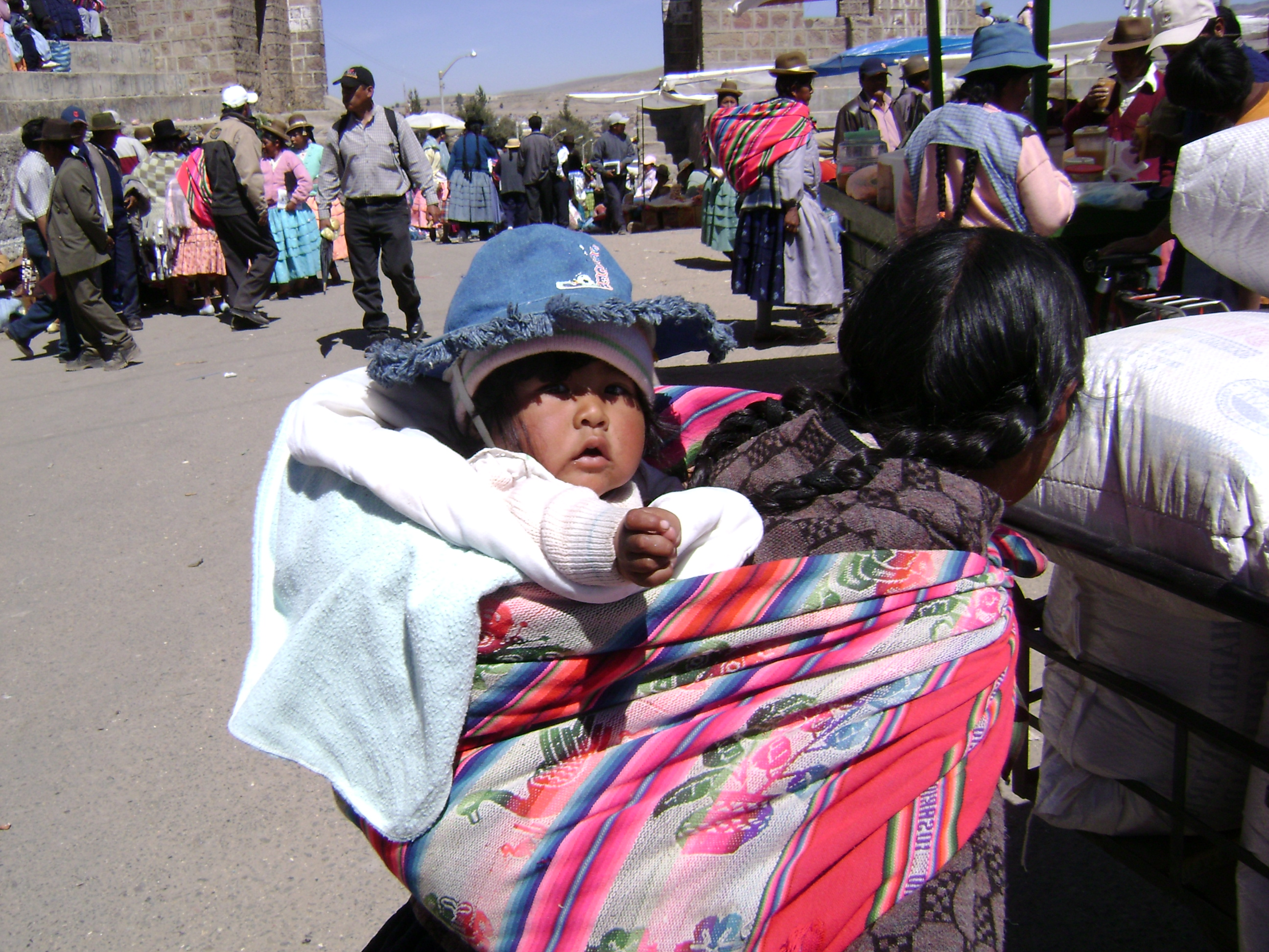 photo prise lors de mon voyage au Pérou et Bolivie, celle-ci prise à Copacabana , Bolivie.